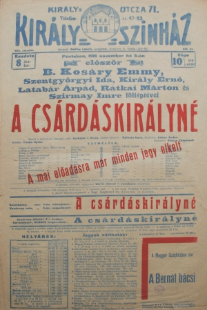 A Csárdáskirálynő első magyarországi bemutatójának plakátja.